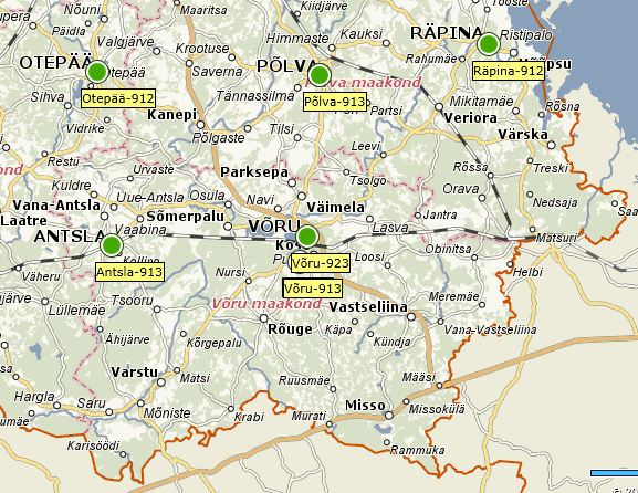 Käesolev foto näitab AS Metrotec positsioneerimistarkvara abil Kagu- ja Lõuna- Eesti kiirabibrigaadide asukohti. Antud pildil on kõik brigaadid oma baasides. Roheline värv näitab valmidust uueks väljakutseks